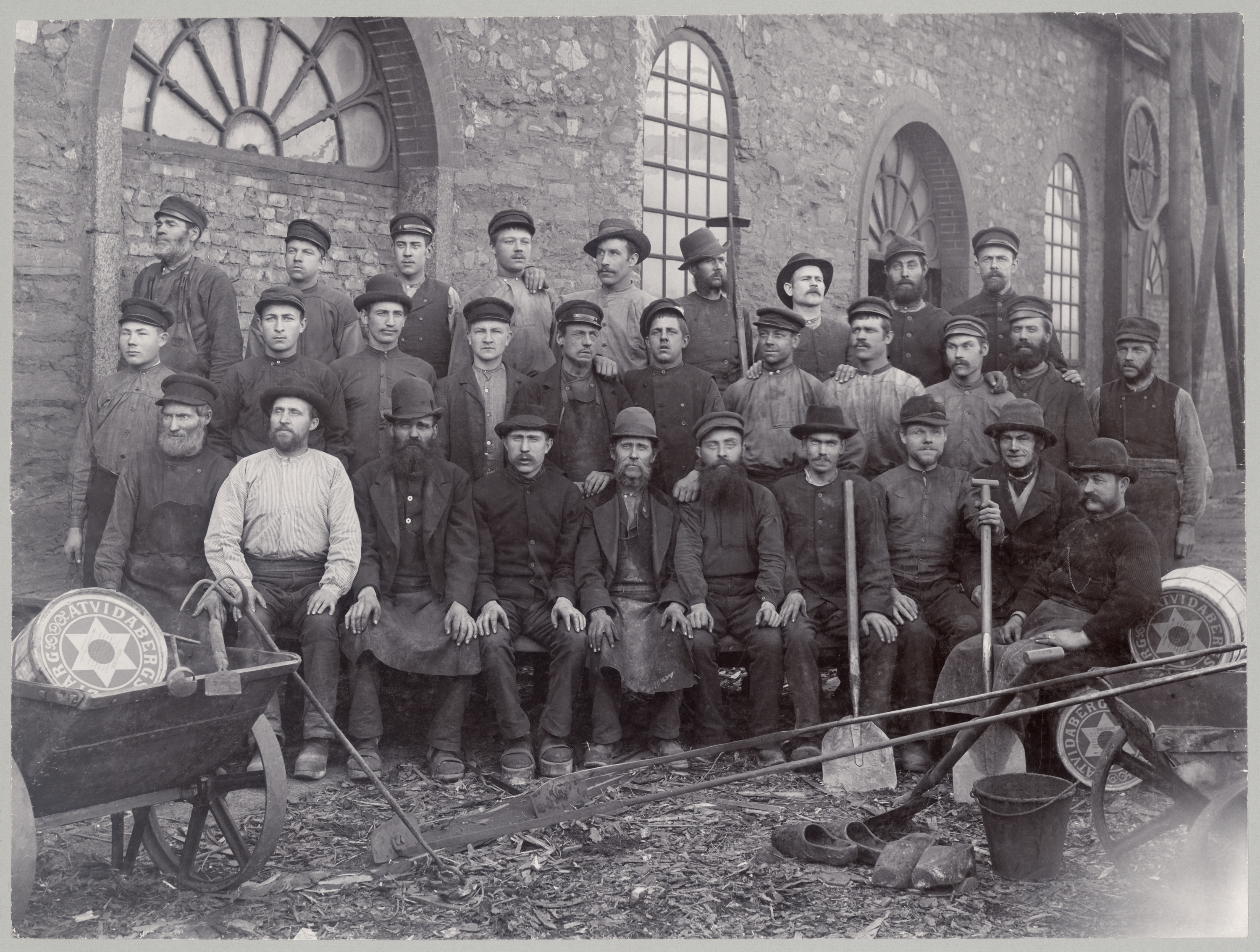 Östergötland. Bankekinds hd. Åtvids sn. Åtvidaberg. Grupp av kopparverksarbetare, Åtvidaberg.